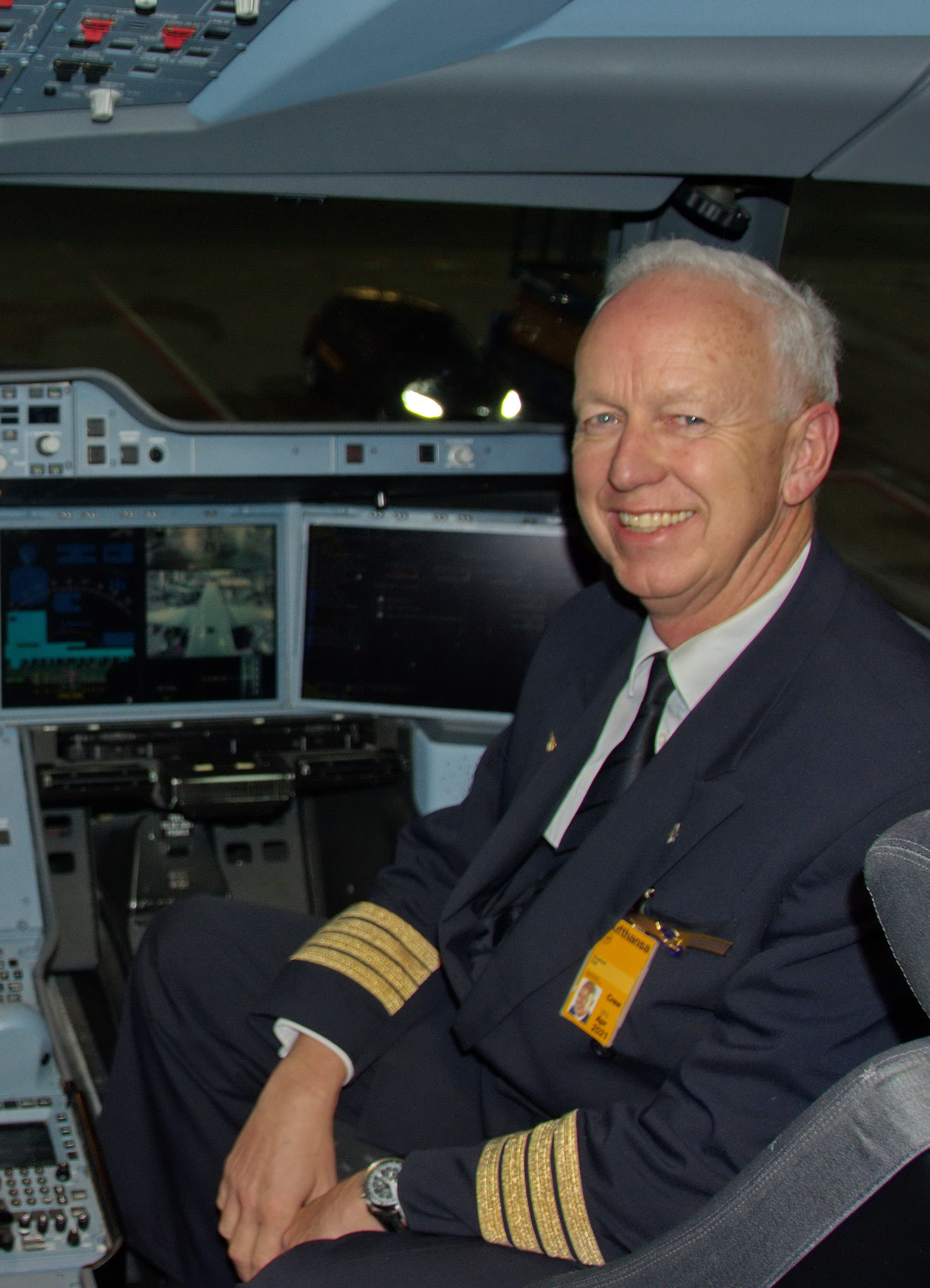 Rolf Stünkel im Jahr 2019